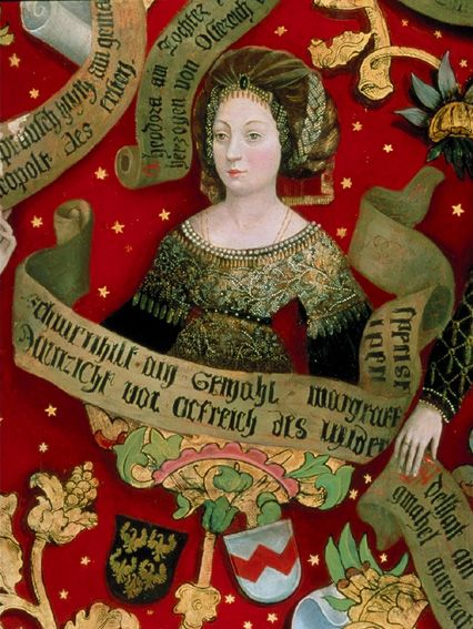 Markgräfin Swanhilt, Gattin von Markgraf Heinrich I. (Babenberger Stammbaum, Stift Klosterneuburg)